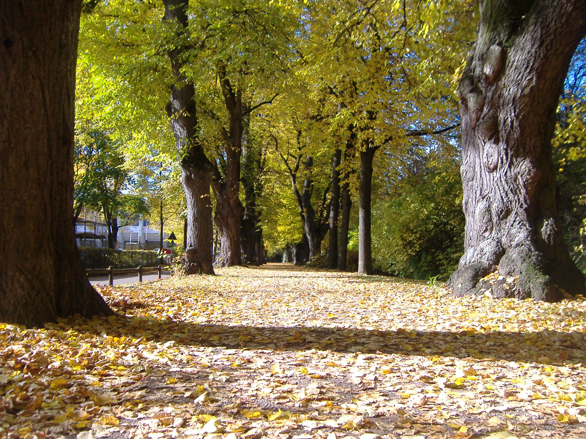 Allee im Wittelbacher Park